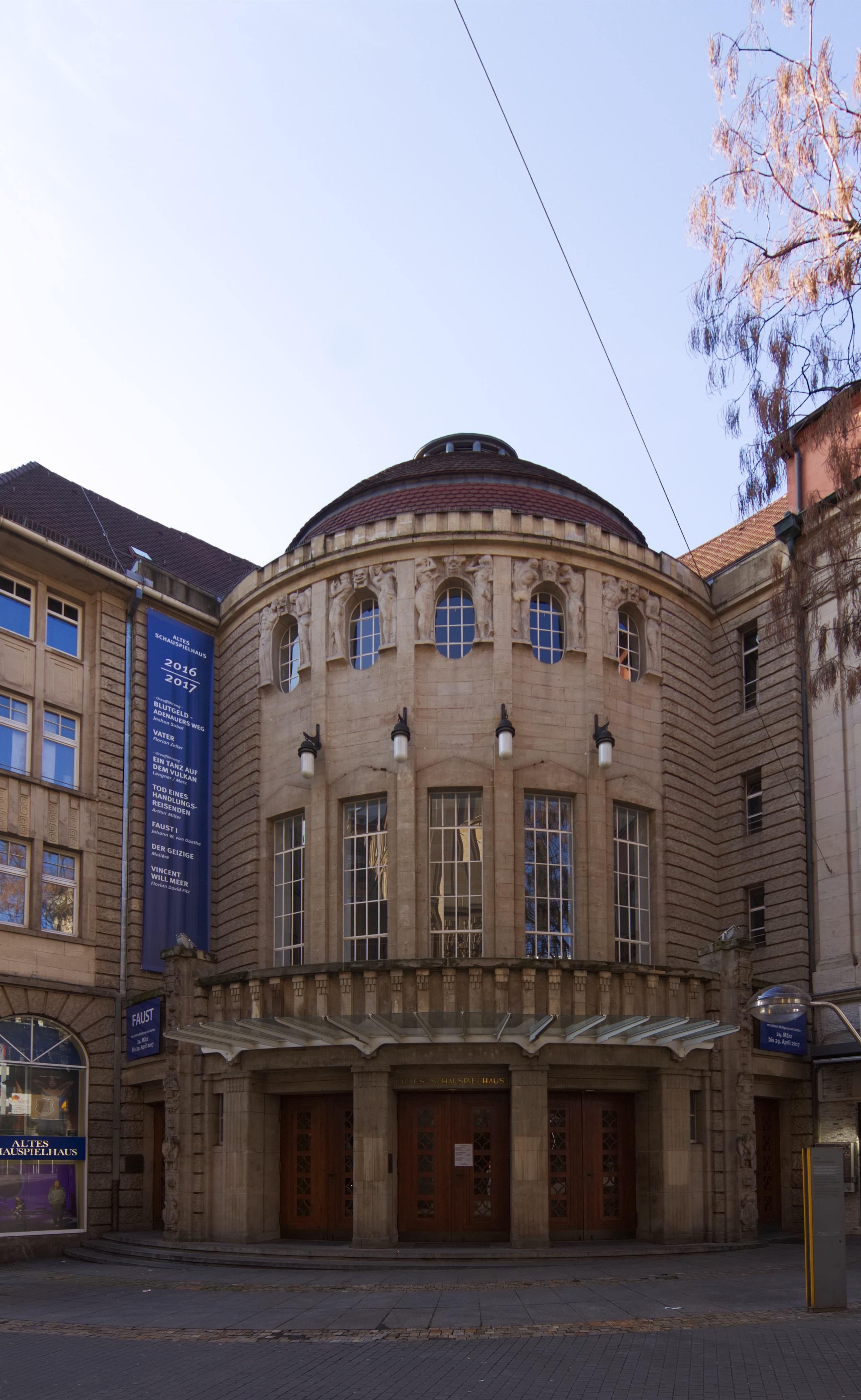 Altes Schauspielhaus, Kleine Königstraße 9, Stuttgart. Erbaut 1909 und 1980-1983 von Eitel und Steigleder im Jugendstil. Geschützt nach § 2 DSchG.